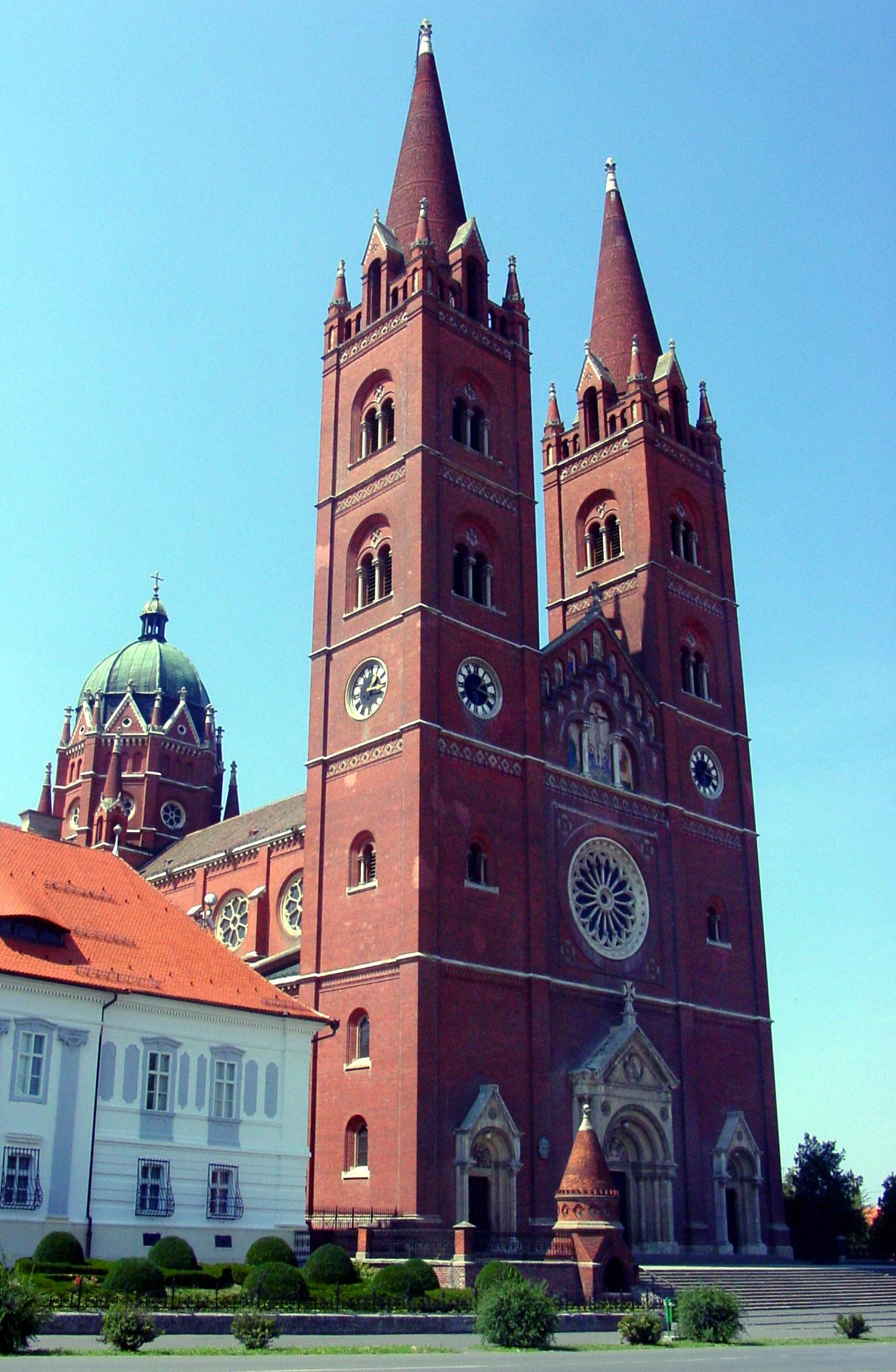 Ђаково 2003. године (Слику направио Борис Малагурски) ☺ Ову слику је направио Борис Малагурски.